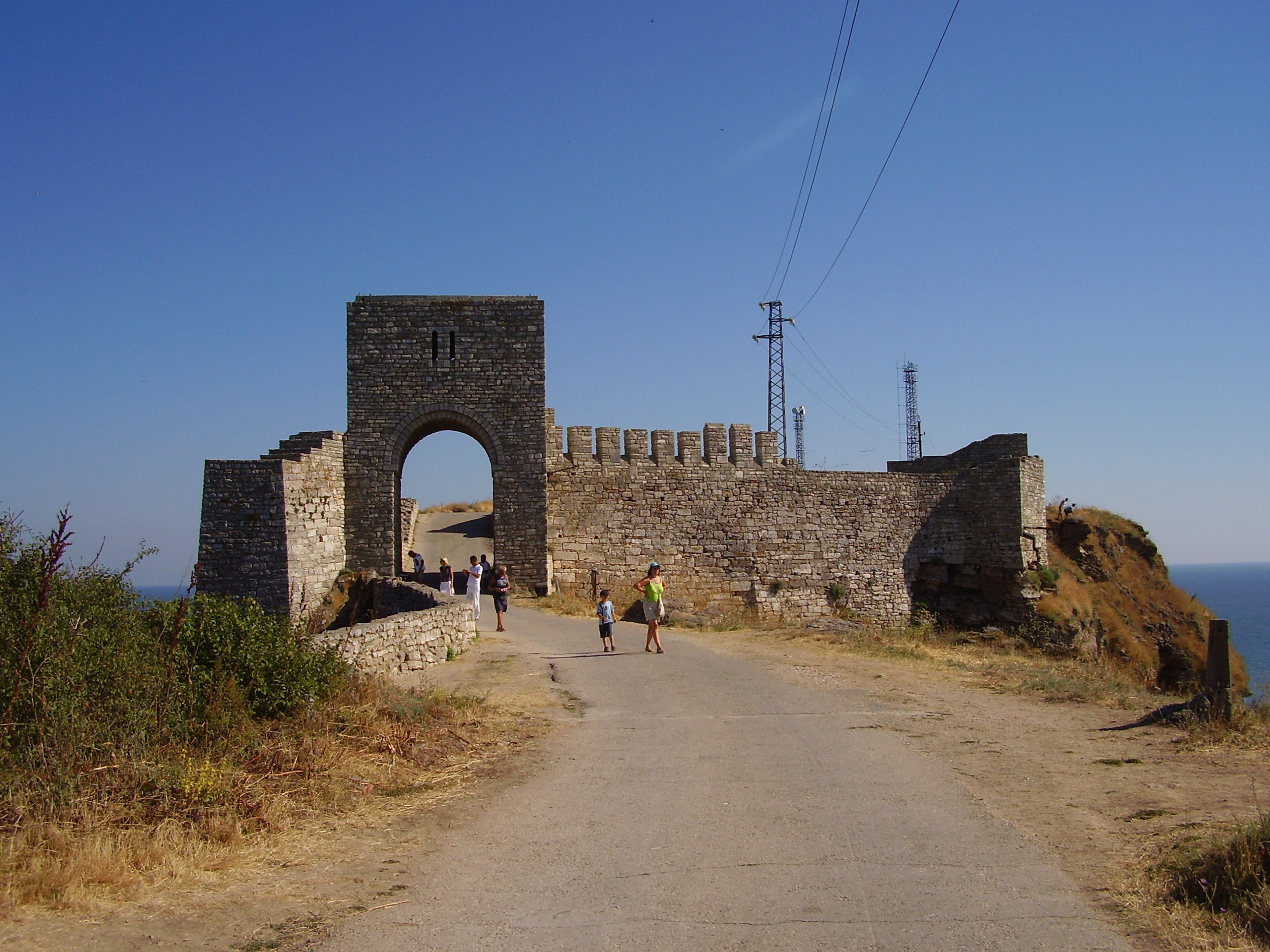 Крепостта на Калиакра